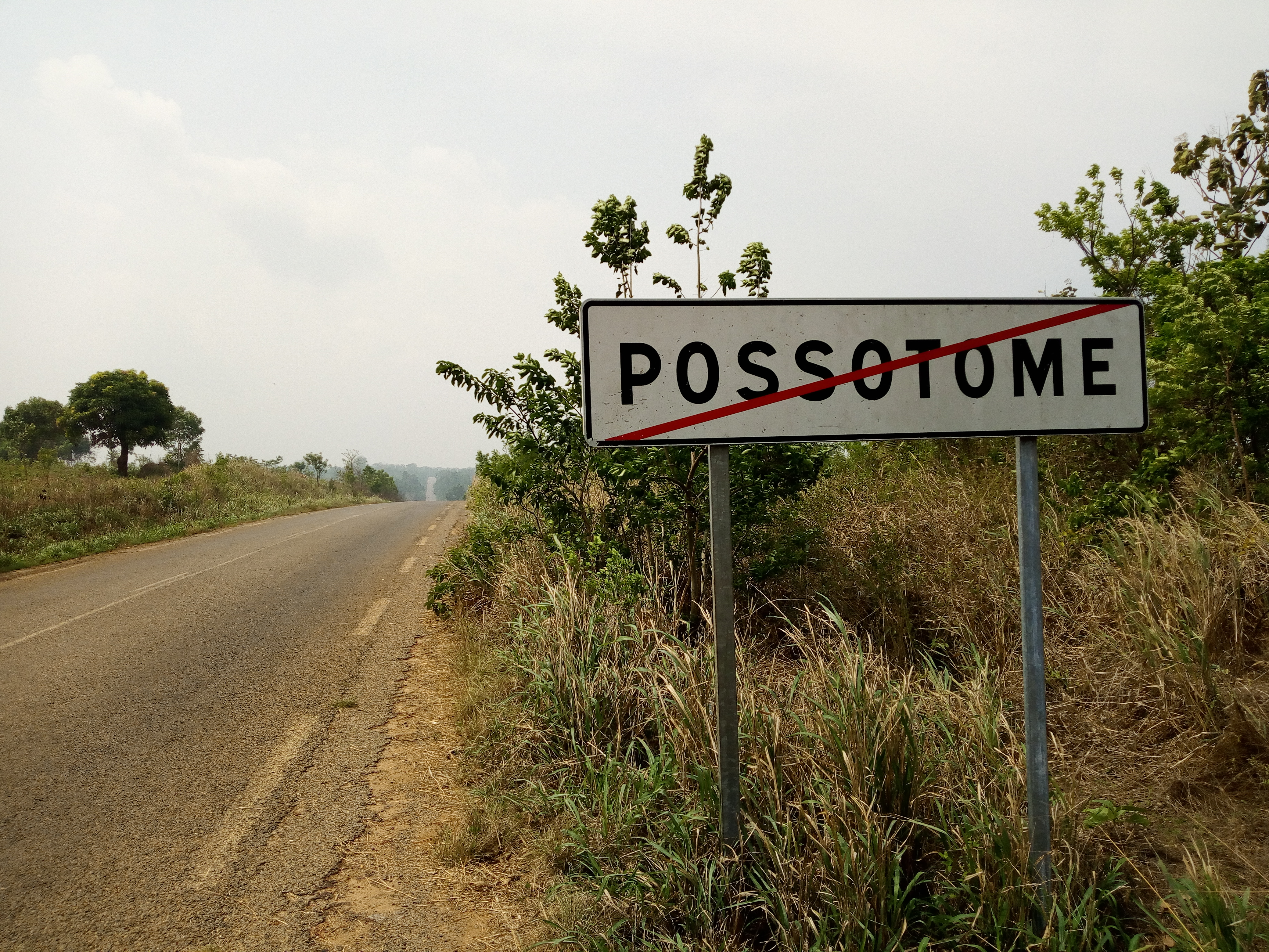 Plaque indiquant la fin de délimitation de la localité de possotomè au Bénin This is an image with the theme "Africa on the Move or Transport" from: Benin